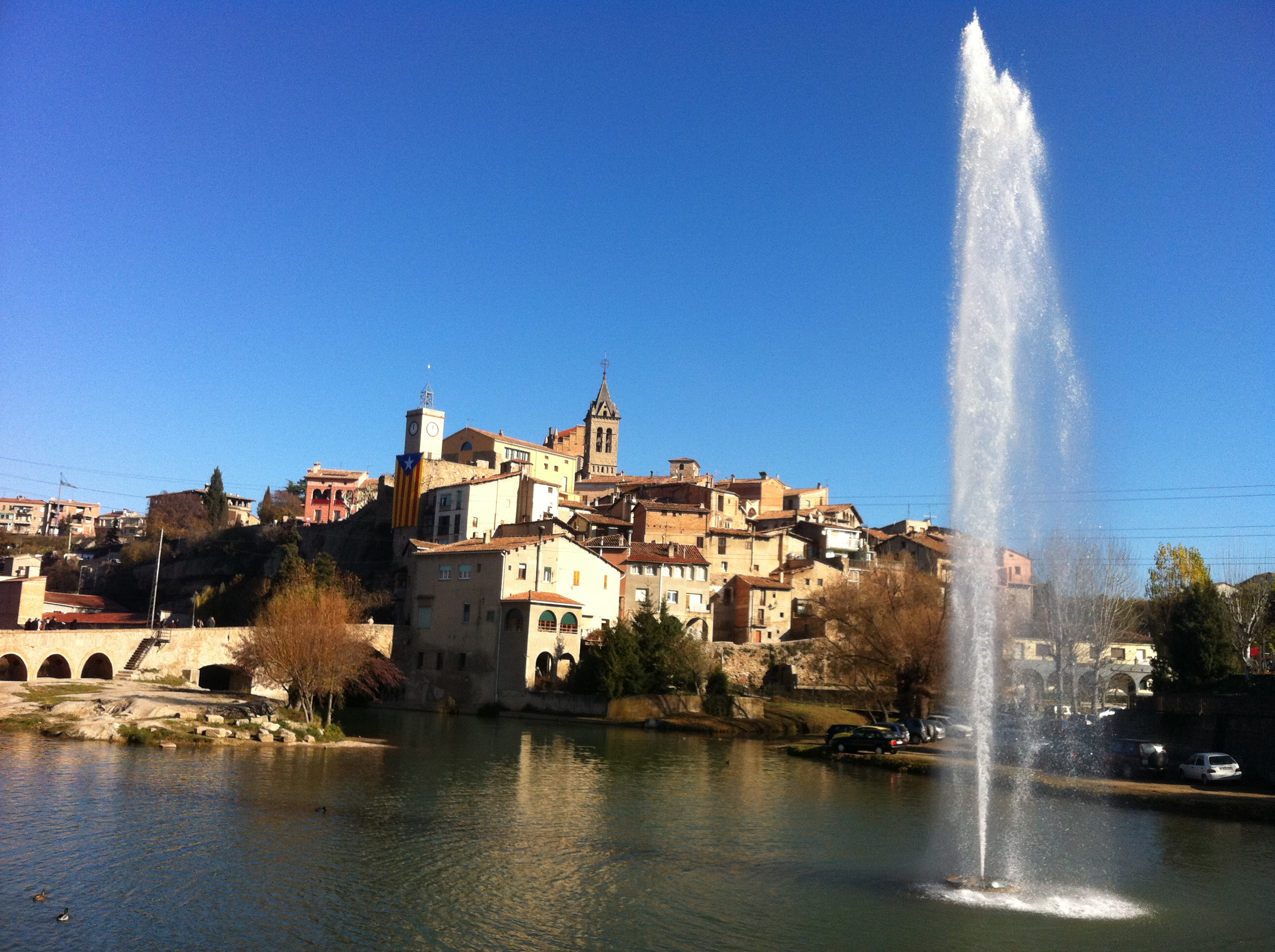 Imatge del nucli antic de Gironella des del carrer del riu amb el brollador i el pont vell.